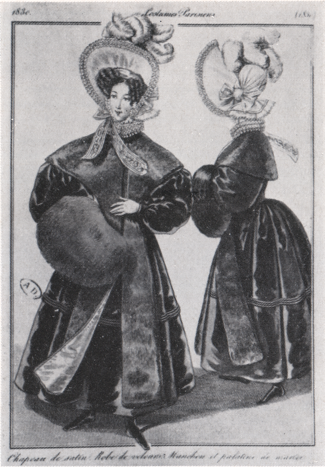 Les Dames Parisens. 1830. Chapeau de satin. Robe et palatins de ...